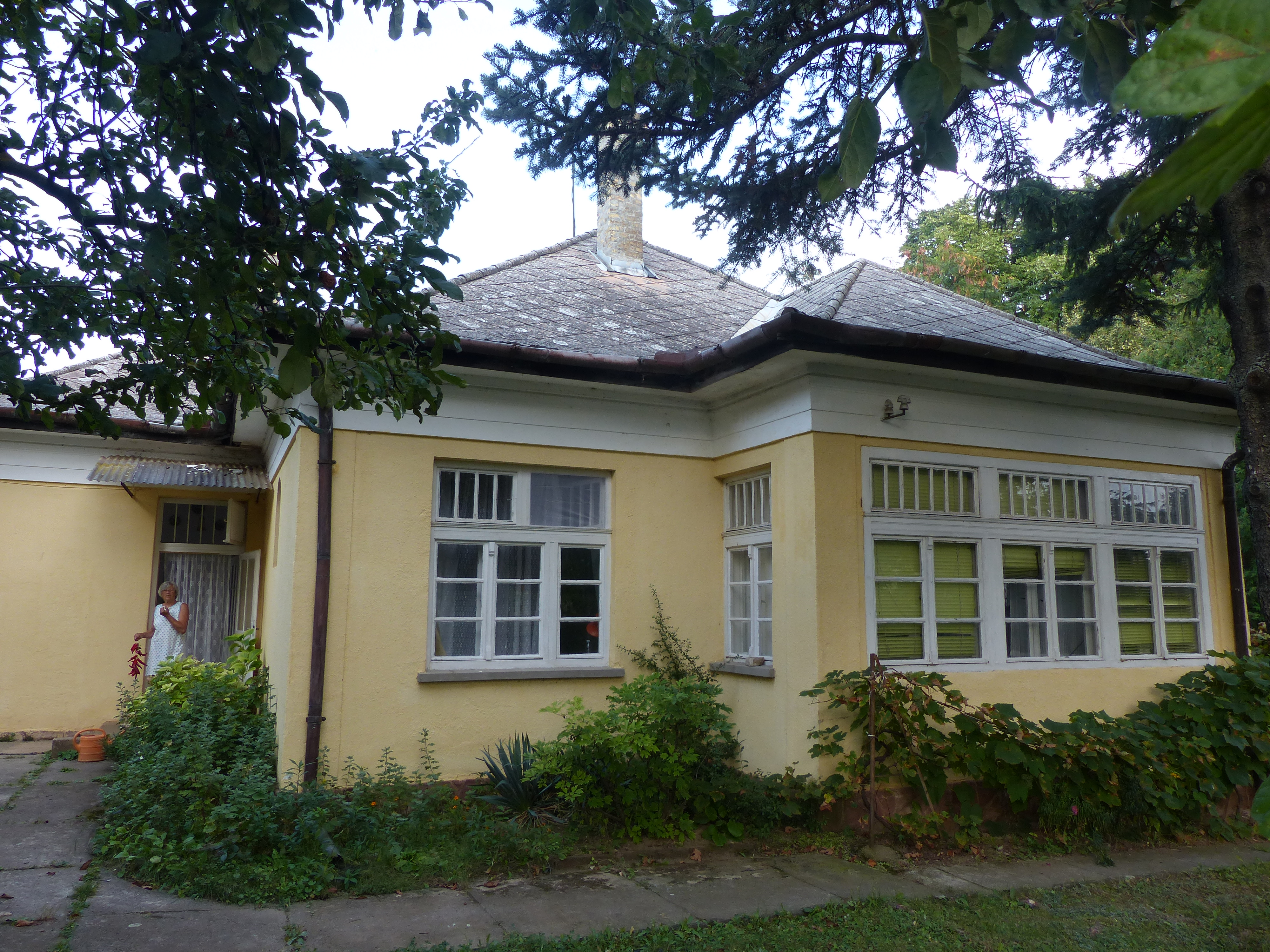 Kratochvil Károly, a Székely Hadosztály parancsnoka háza Balatonszepezden, a Halász utca 26 szám alatt. A felvétel 2016. szeptember 13-án, kedden készült. Halála után felesége, Izay Borbála élt a házban haláláig, 1982-ig. 1919. január 5-én a kolozsvári helyőrség parancsnokává még novemberben kinevezett Kratochvil Károly – miután az általa irányított hadtesteket teljes felszereléssel hazahozta az olasz frontról – a román betörés hírére főleg székelyekből álló haderőt toborzott. A Székely Hadosztálynak Kratochvil január 13-án kiadott hadparancsa szerint a Máramarosszigettől (a Király-hágón át) a Belényesi-medencéig tartó, mintegy 170 kilométeres szakaszon gyakorlatilag lezárta a román hadsereg Magyarország felé nyomulását. Frontszakasz alakult ki, amit a hiányosan felszerelt magyar katonák egészen április 16-ig tartottak – e néhány hónap alatt állandó összecsapások voltak a két fél között. A Székely Hadosztály gyakorlatilag két tűz közé szorult – keletről a román hadsereg, nyugatról pedig a budapesti bolsevik vöröskatonák közé kerültek, a vörösök hátba támadták őket. Április 26-án Demecser községnél Kratochvil Károly kiadta utolsó hadparancsát. Domonkos László történész szerint a Székely Hadosztály védekező hadműveleteinek következménye a megszálló román haderő megállítása mellett az is, hogy a románok nem követtek el az 1848-ashoz hasonló tömeggyilkosságokat. Cimkék: Kratochvil Károly 1919 in Hungary Balatonszepezd Székely Land Székely Army 1919 History of Hungary Források: ARADA90 – Domonkos László - Elfelejtett Parancsnok: Kratochvil Károly (hozzáférés: 2016.09.17), Méltók és méltatlanok: (hozzáférés: 2016.09.17), Domonkos László: Az elárult hadosztály Püski Masszi Könyvesház, Budapest, 2009, Domonkos László: Az elfelejtett parancsnok Püski Masszi Könyvesház, Budapest, 2010